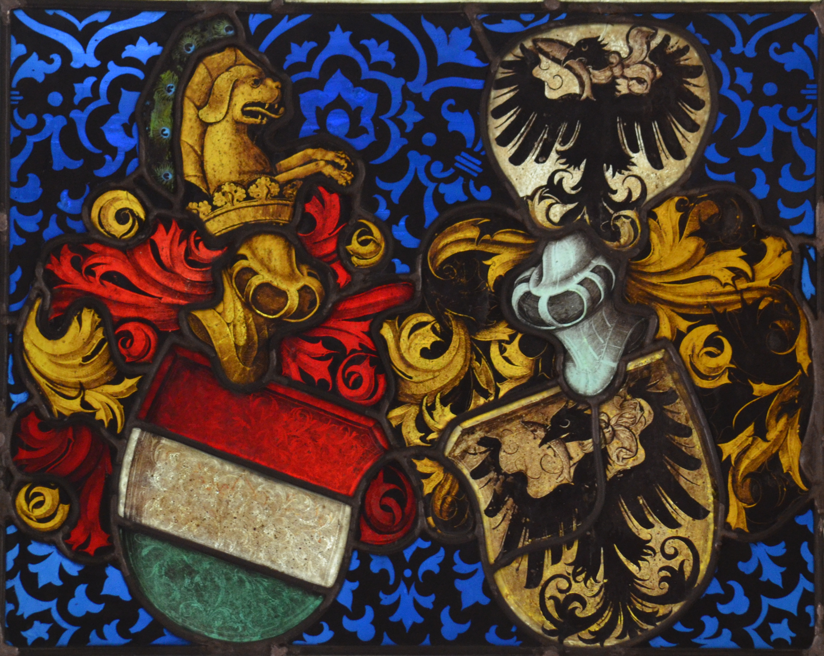 Kirche Auenstein, Scheibe Fricker-Schad, um 1500